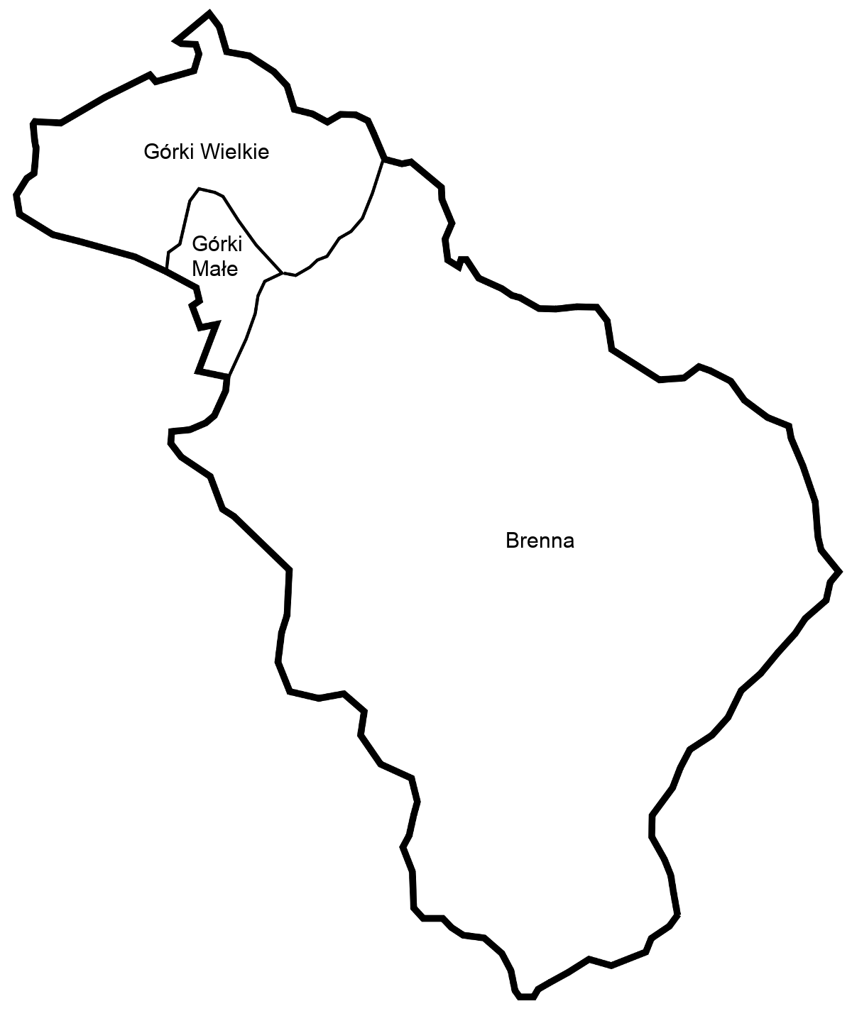 Sołectwa gminy Brenna